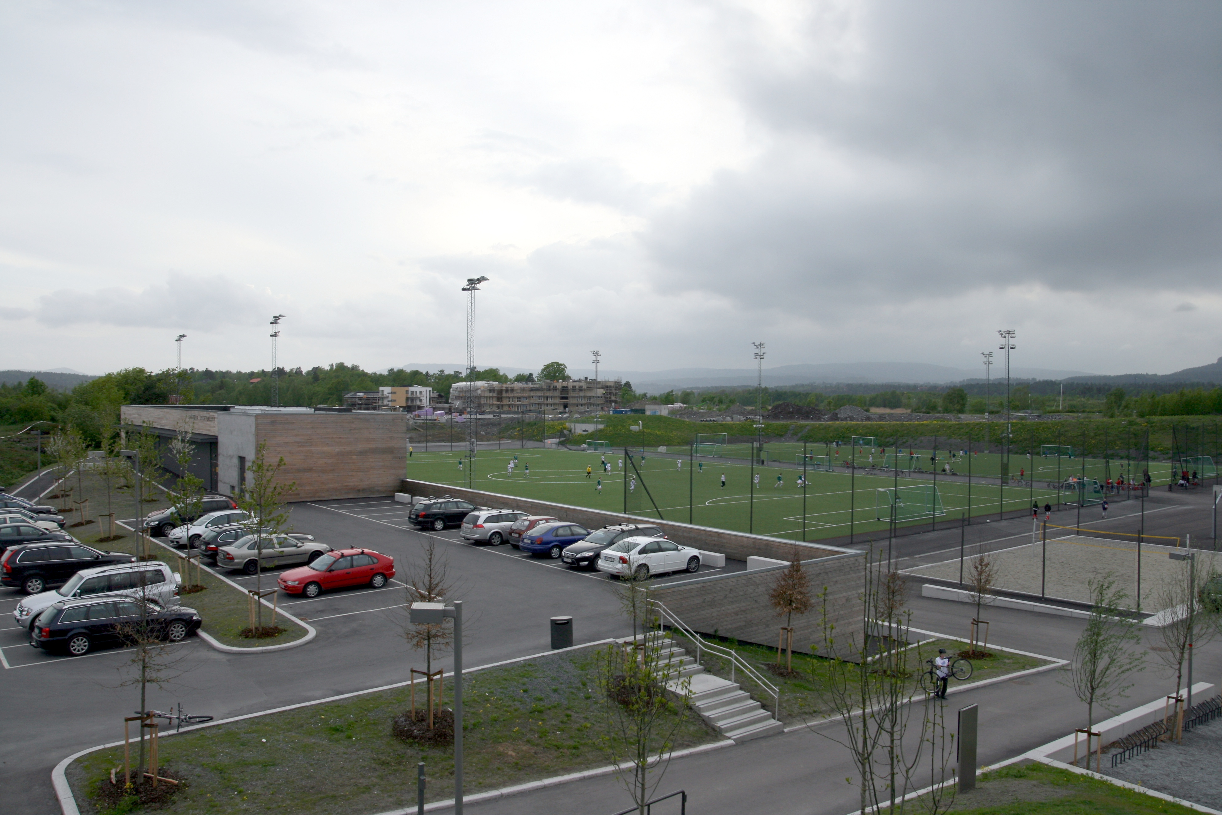 Fra Hundsund grendesenter.